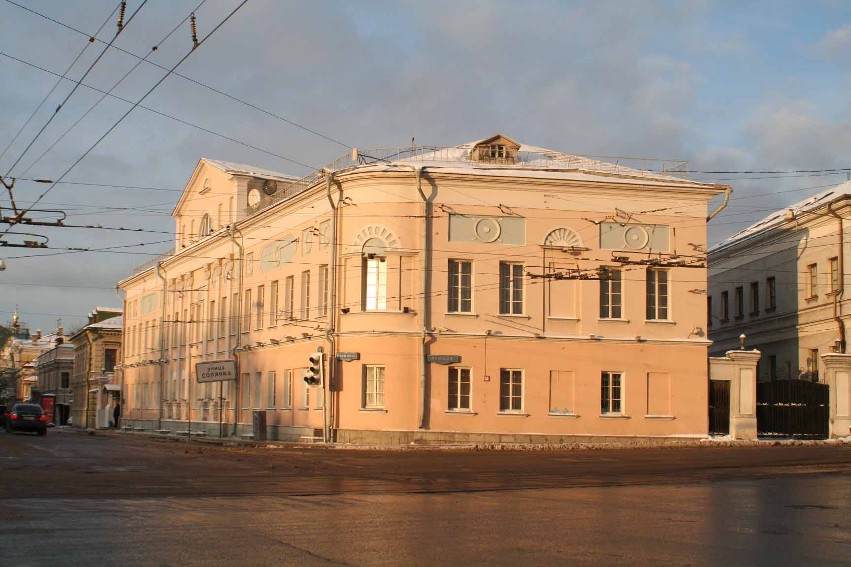 Солянка, дом 15/18. Главный дом городской усадьбы Боковых. Начало XIX века.